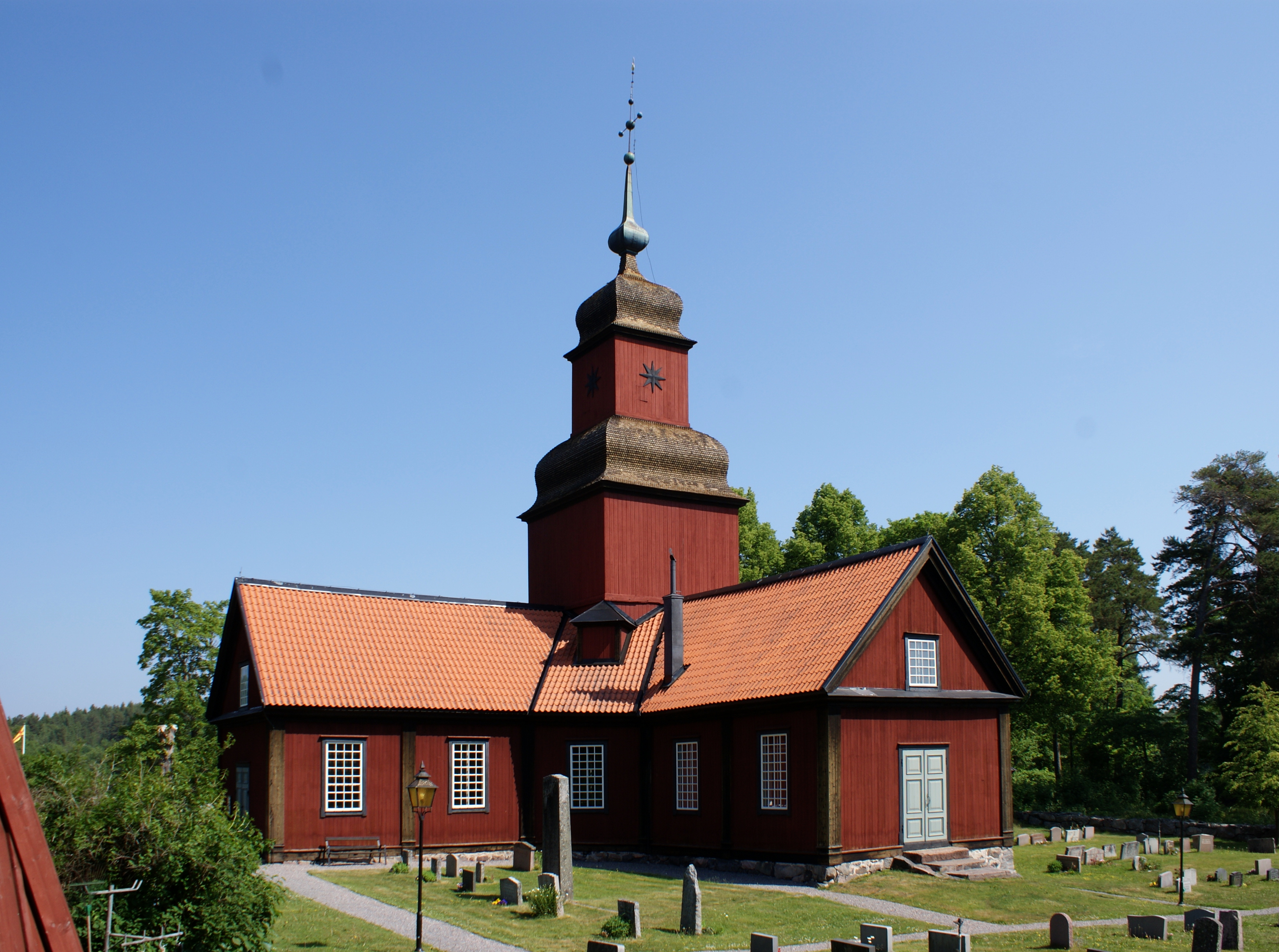 Roslags-kulla kyrka This file was made possible through a cooperation with the Cloudberry project.